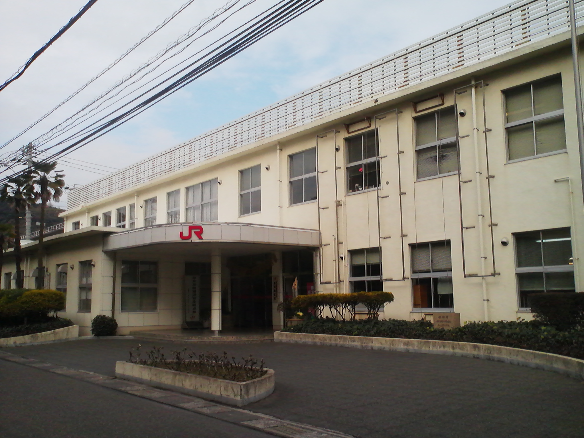 九州旅客鉄道鹿児島支社の外観。